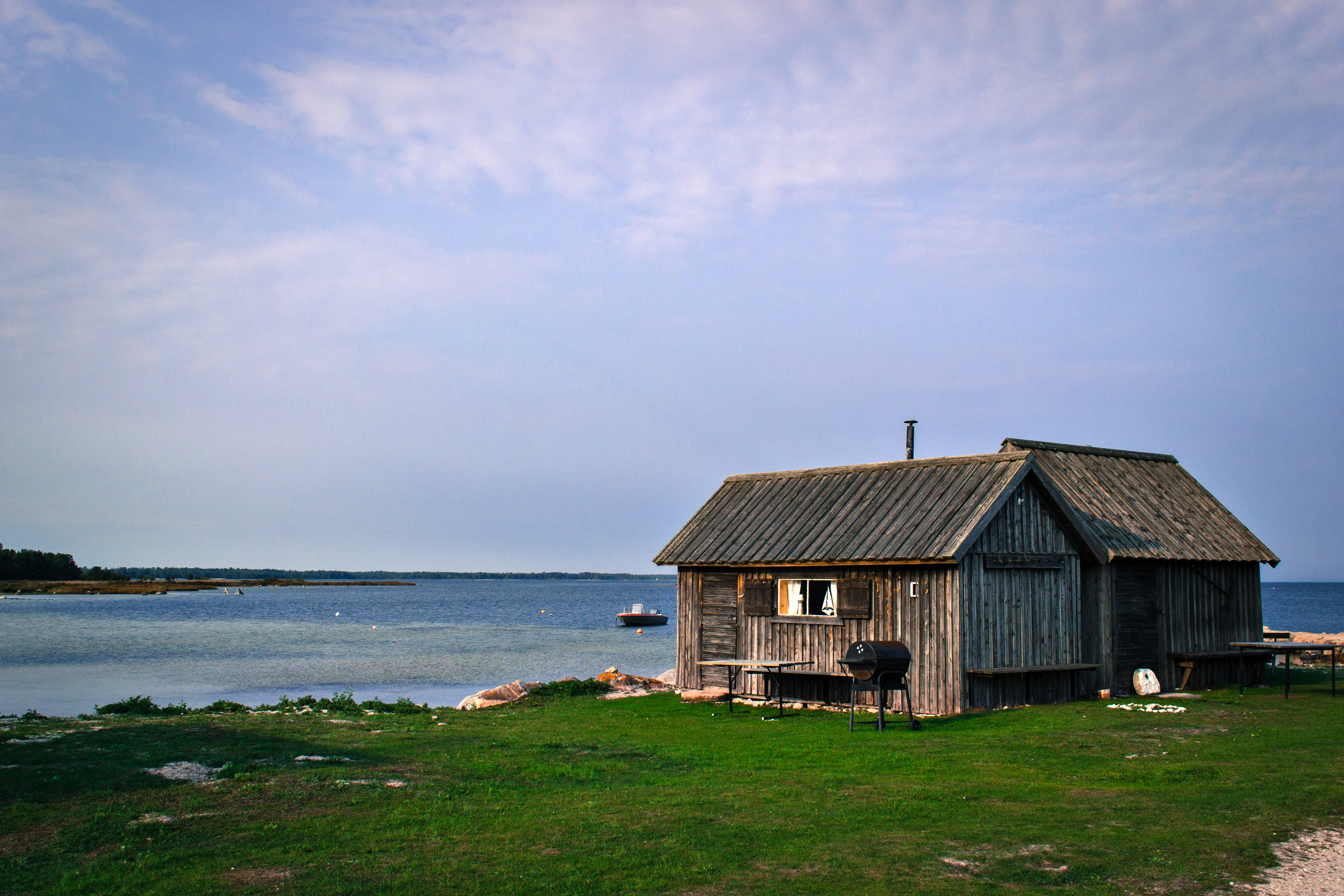 Estación pesqueira de Baju, na illa sueca de Gotland.